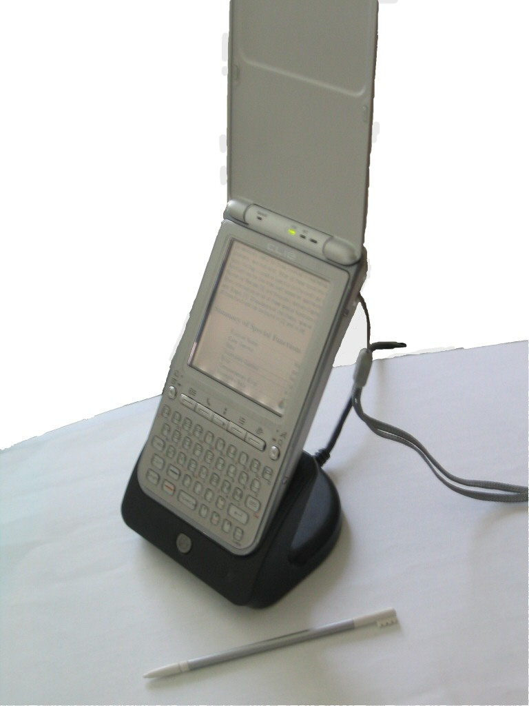 Sony Clié TG50 PDA mit Dockingstation und Stylus